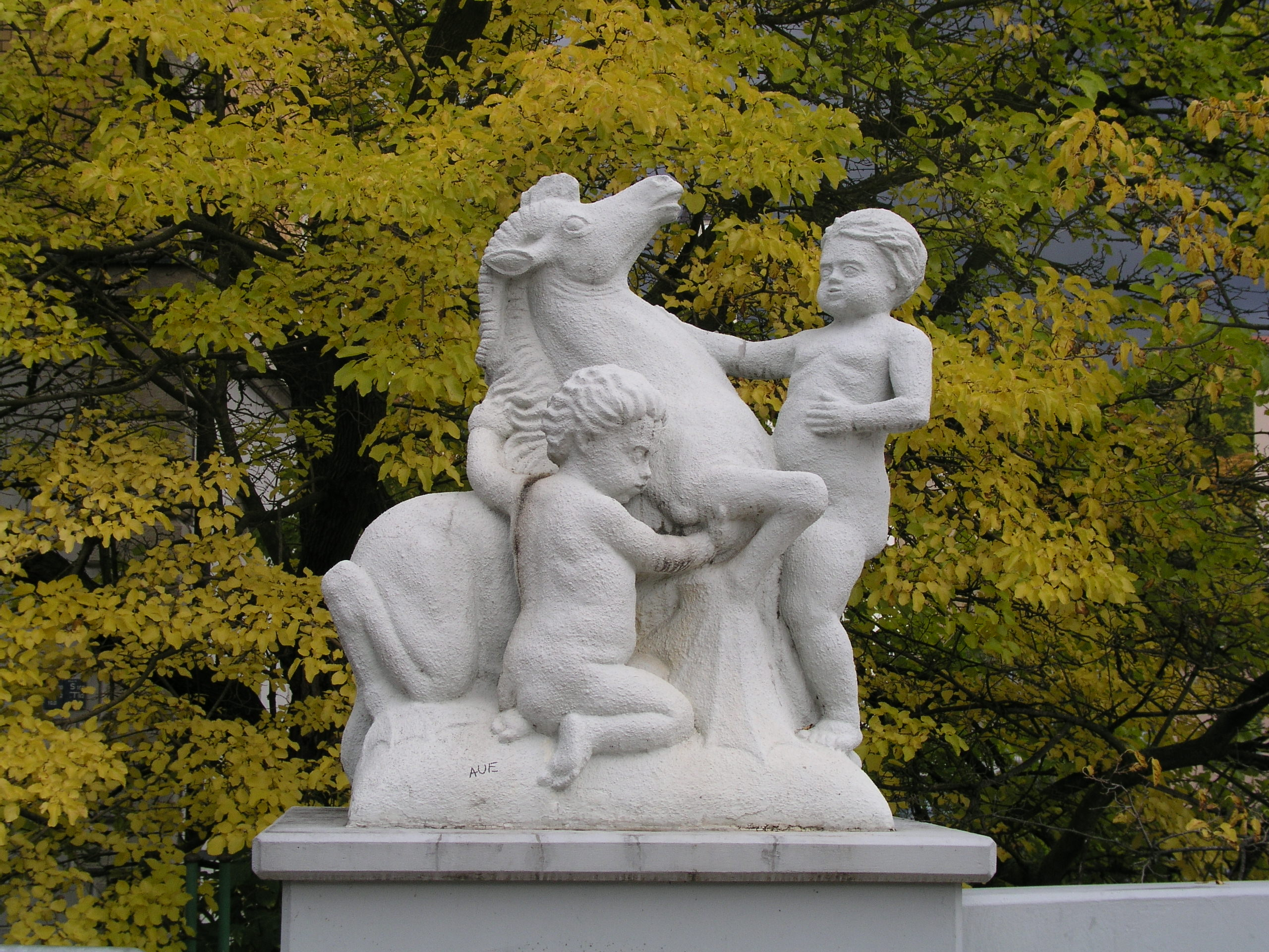 Schulbrücke, Figurenschmuck auf Brückenpfeiler (3)